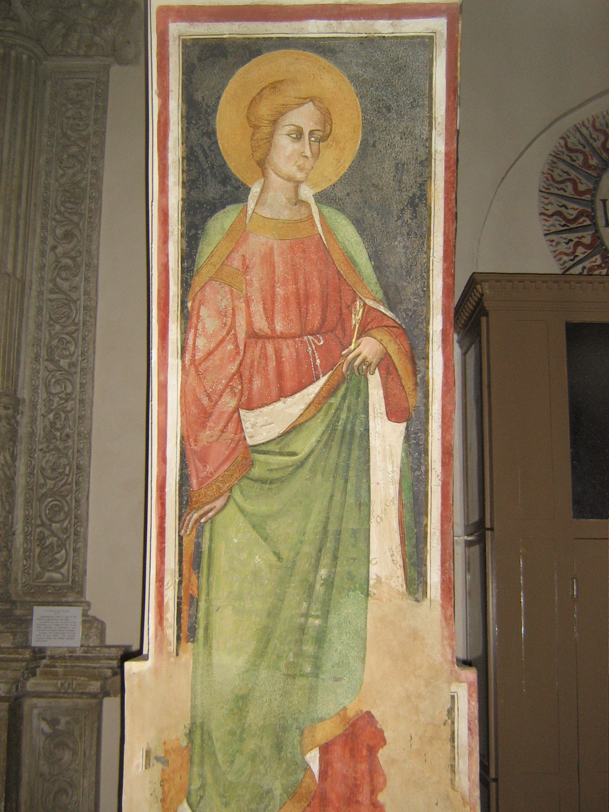 Affresco1 Chiesa di Santa Caterina in Galatina